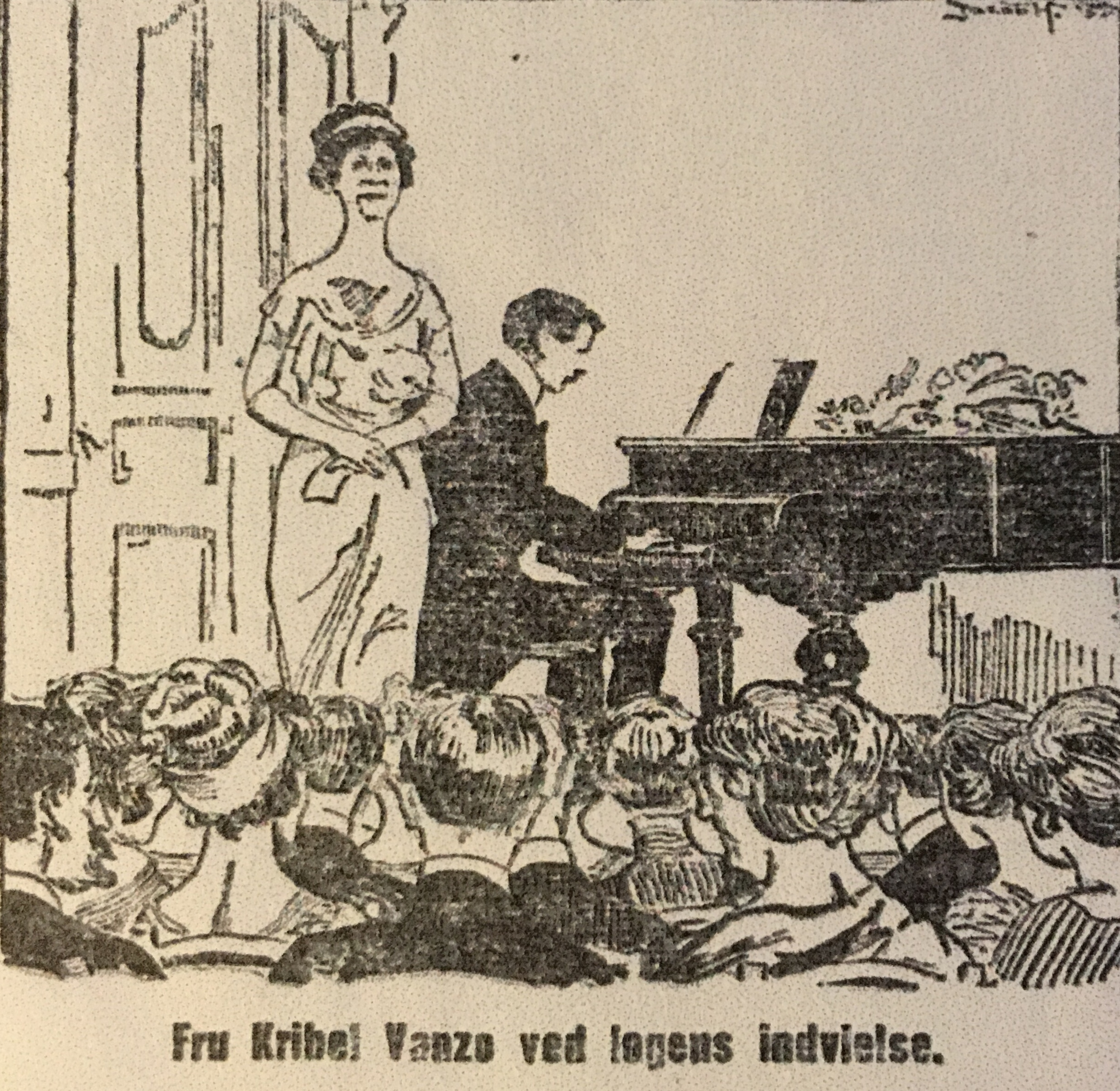 Den internasjonalt berømte, norsk-itallienske sangerinnen Anna Kriebel Vanzo (fra Trondheim) fikk æren av å innvie Frimurerlosjens konsertsal i 1902